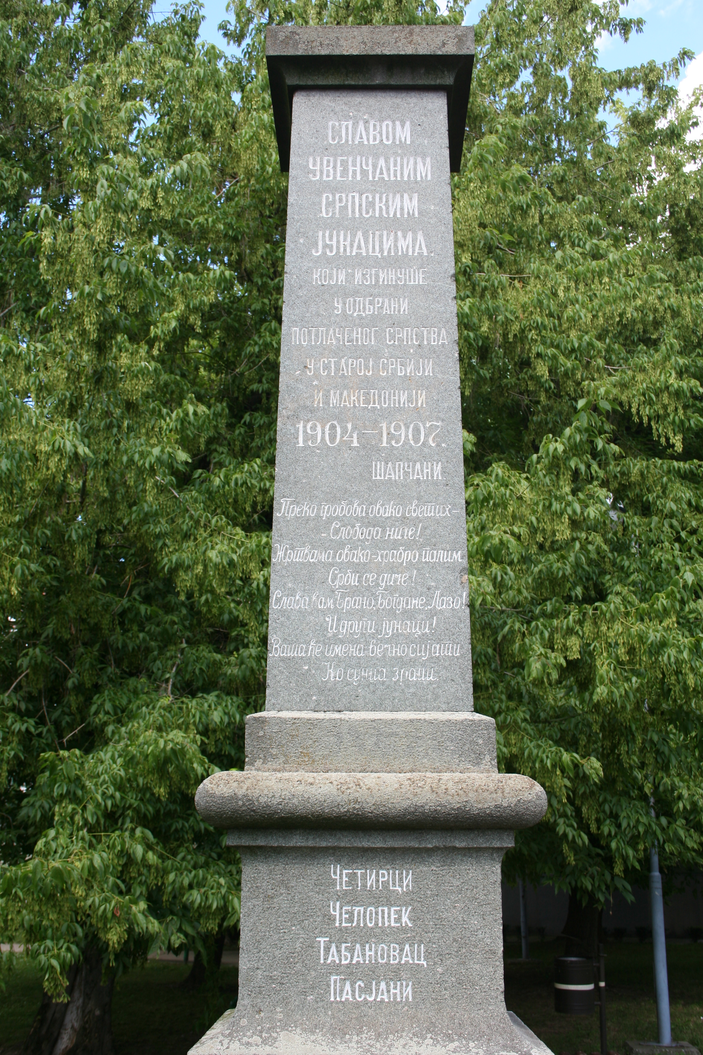 Spomenik poginulim četnicima u Staroj Srbiji i Makedoniji od 1904. do 1907. godine u dvorištu medicinske škole